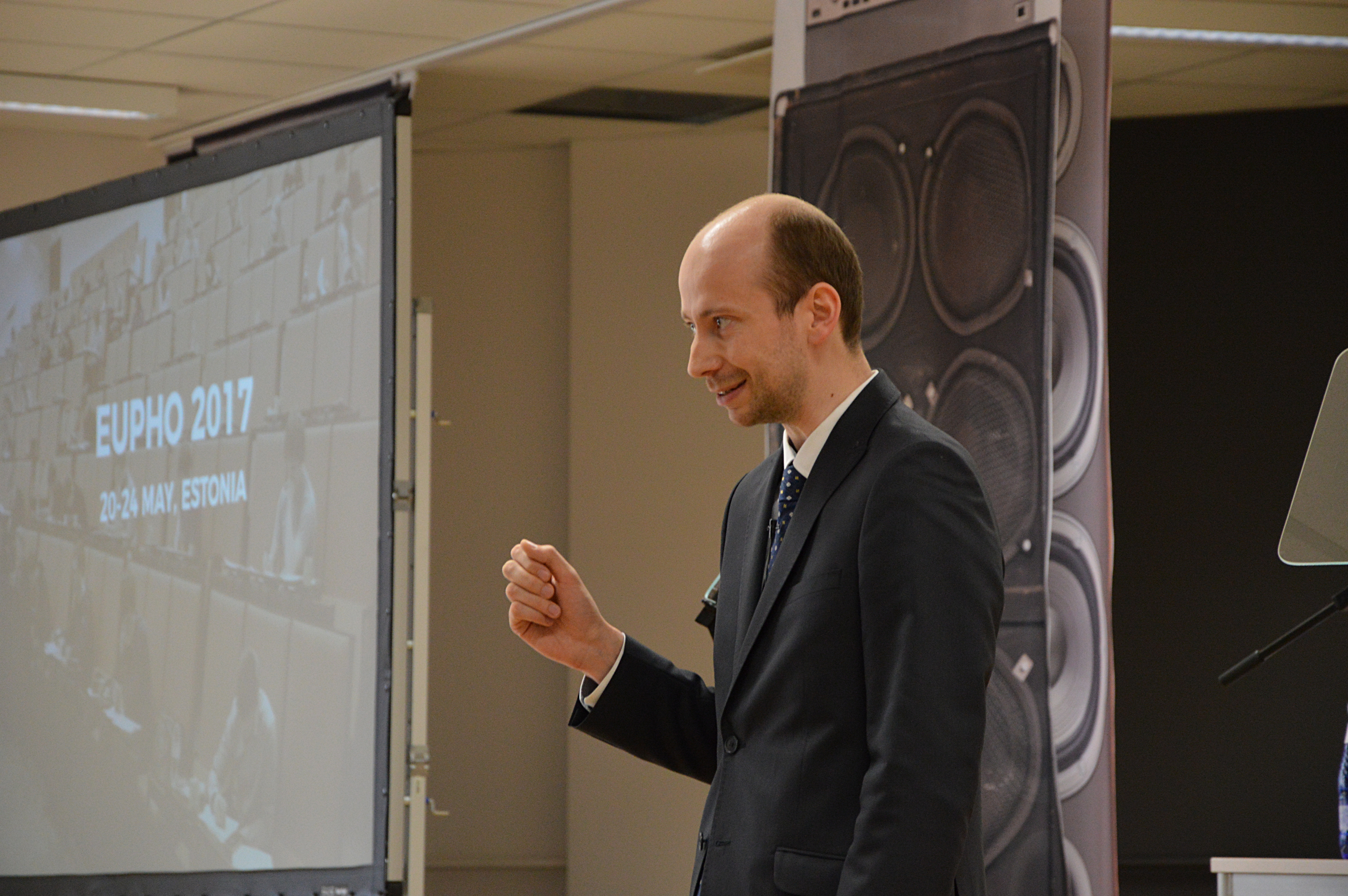 Mihkel Kree